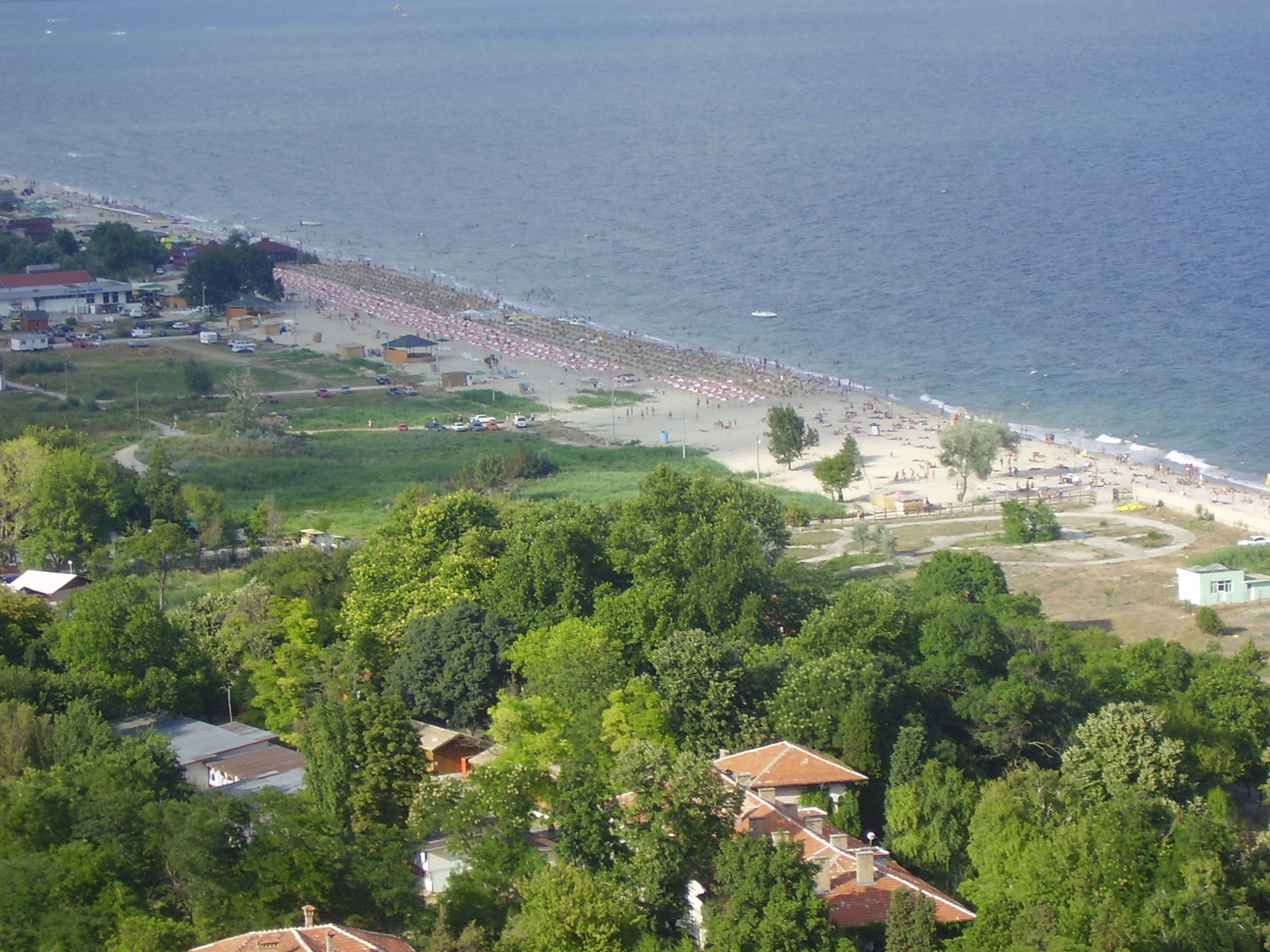 Kranevo, Bulgaria